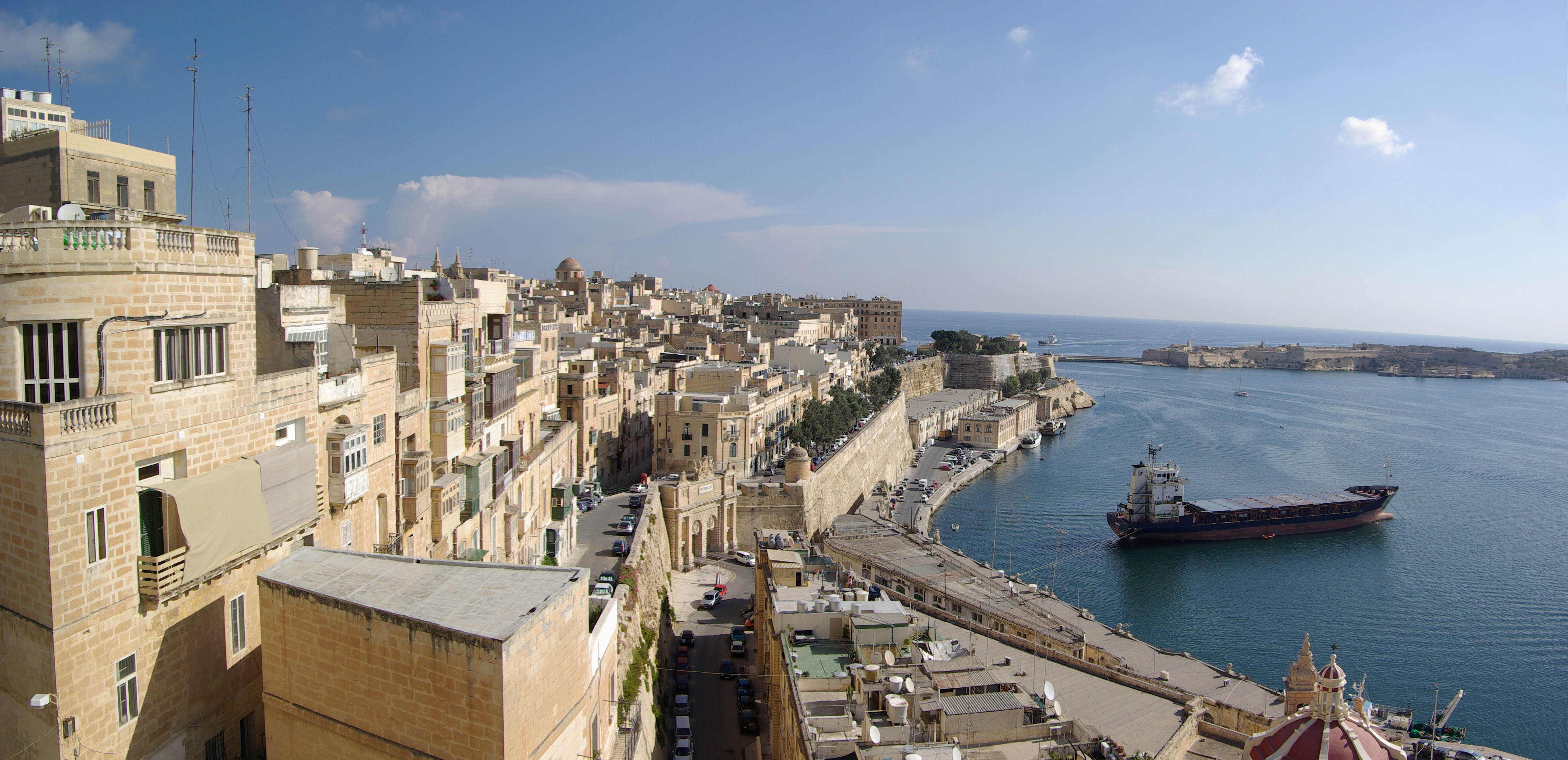 Malta Valletta, von den Upper Barraccagardens aus gesehen